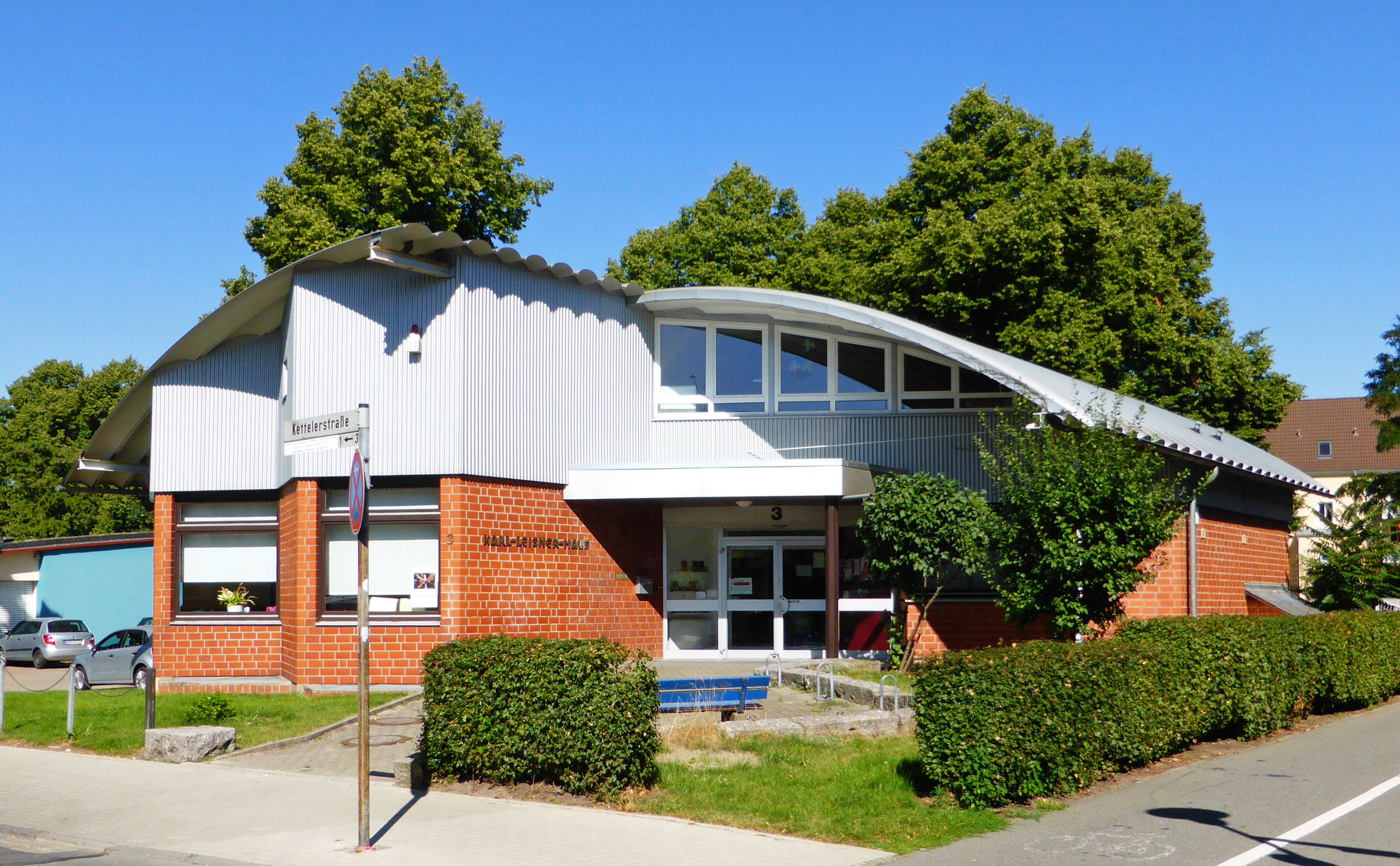 Katholisches Karl-Leisner-Haus (Jugendfreizeitheim) in Wolfsburg.